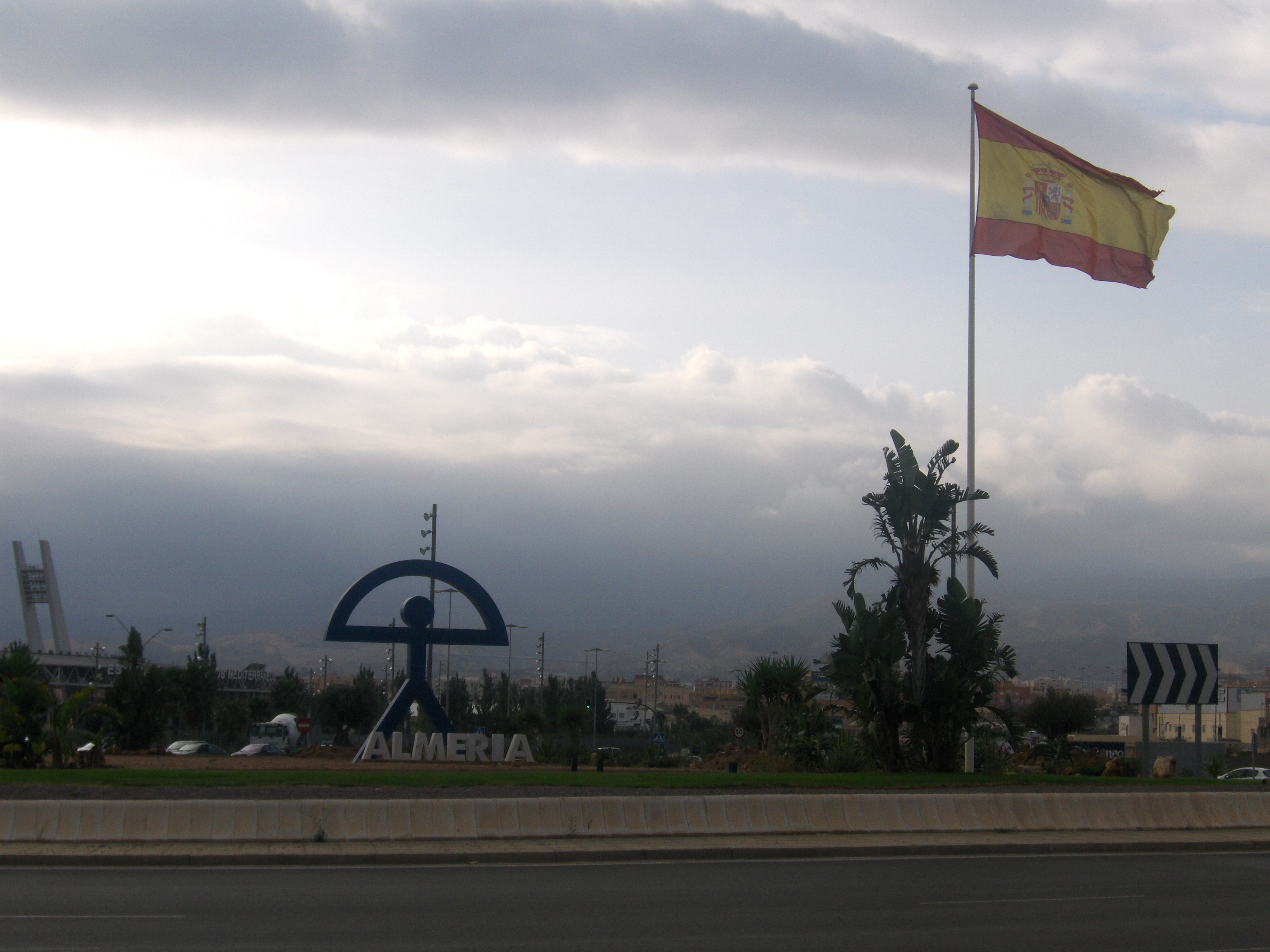 Rotonda al final de la AL-12, en Almería, junto al estadio. Bandera de España, indalo y cartel de Almería